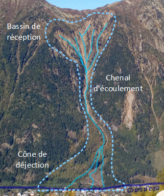 Schéma d'un torrent, triptyque torrentiel. En fond, le versant sud-est des Aiguilles Rouges.